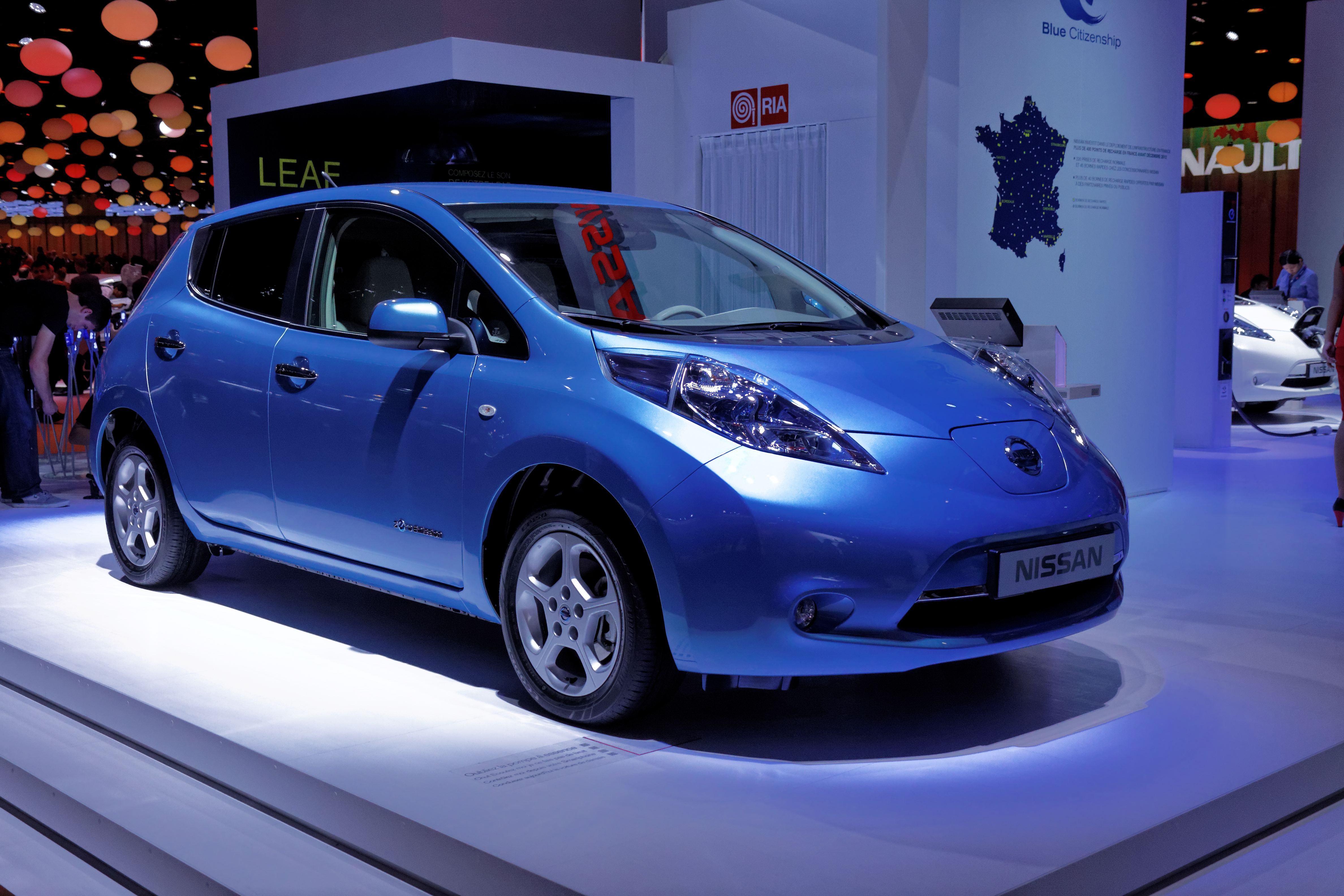 Une Nissan Leaf présentée lors du Mondial de l'Automobile de Paris 2012.